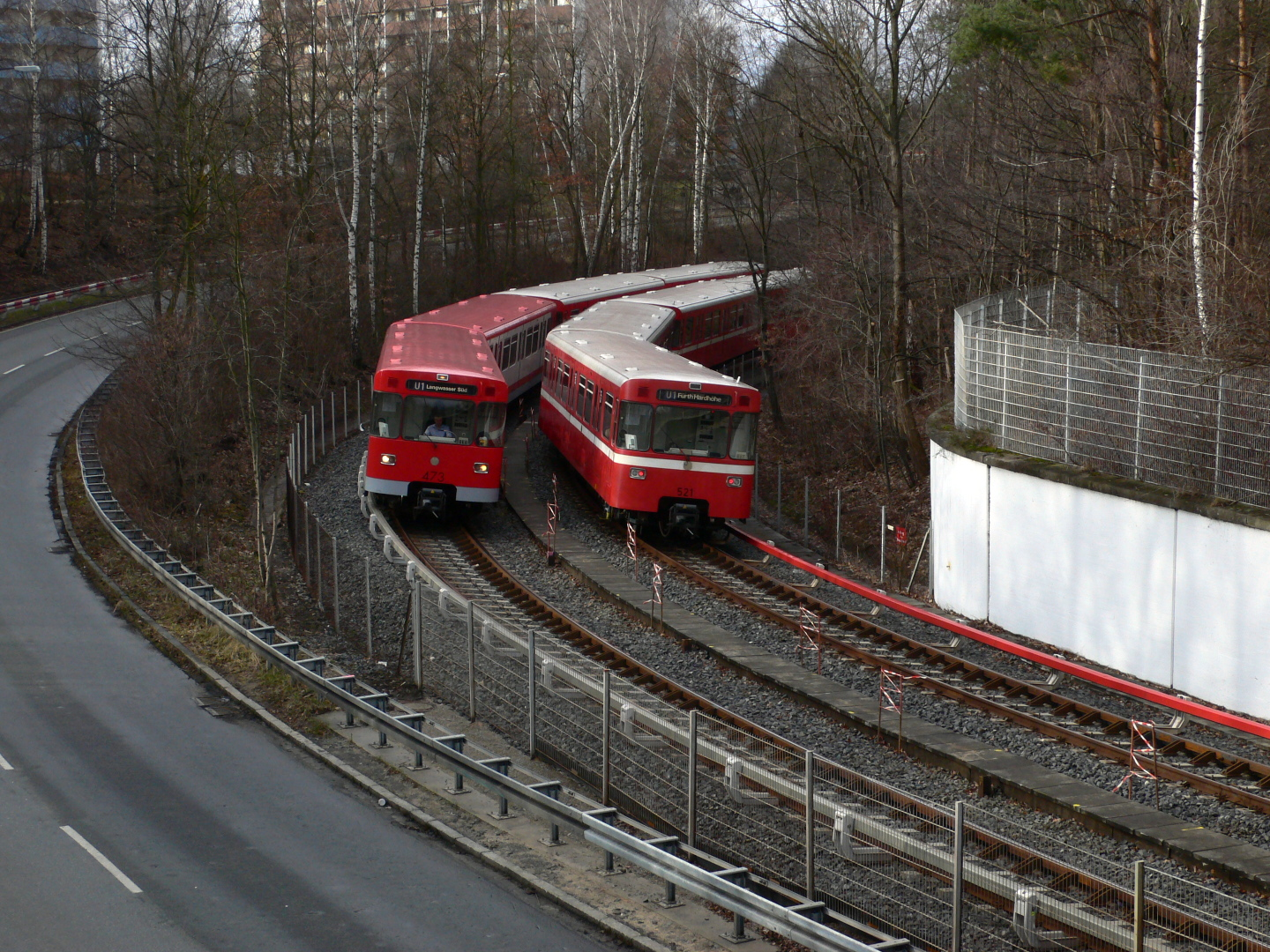 U-Bahn Nürnberg, Streckenabschnitt Messe–Bauernfeindstraße mit zwei sich begegnenden DT1